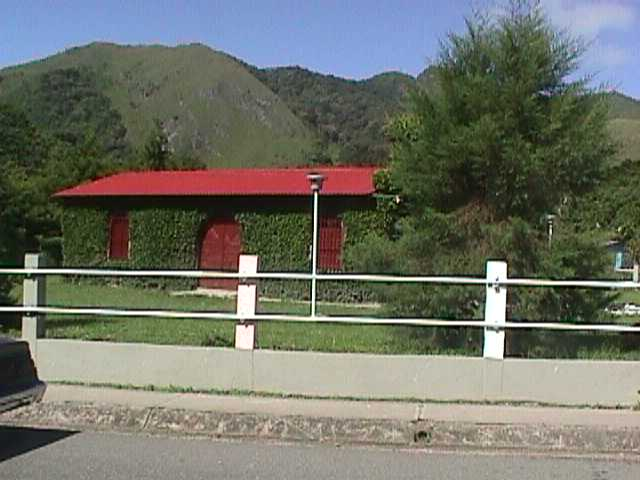 San Agustín, estado Monagas - Venezuela (1998)